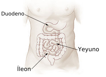 Intestí prim